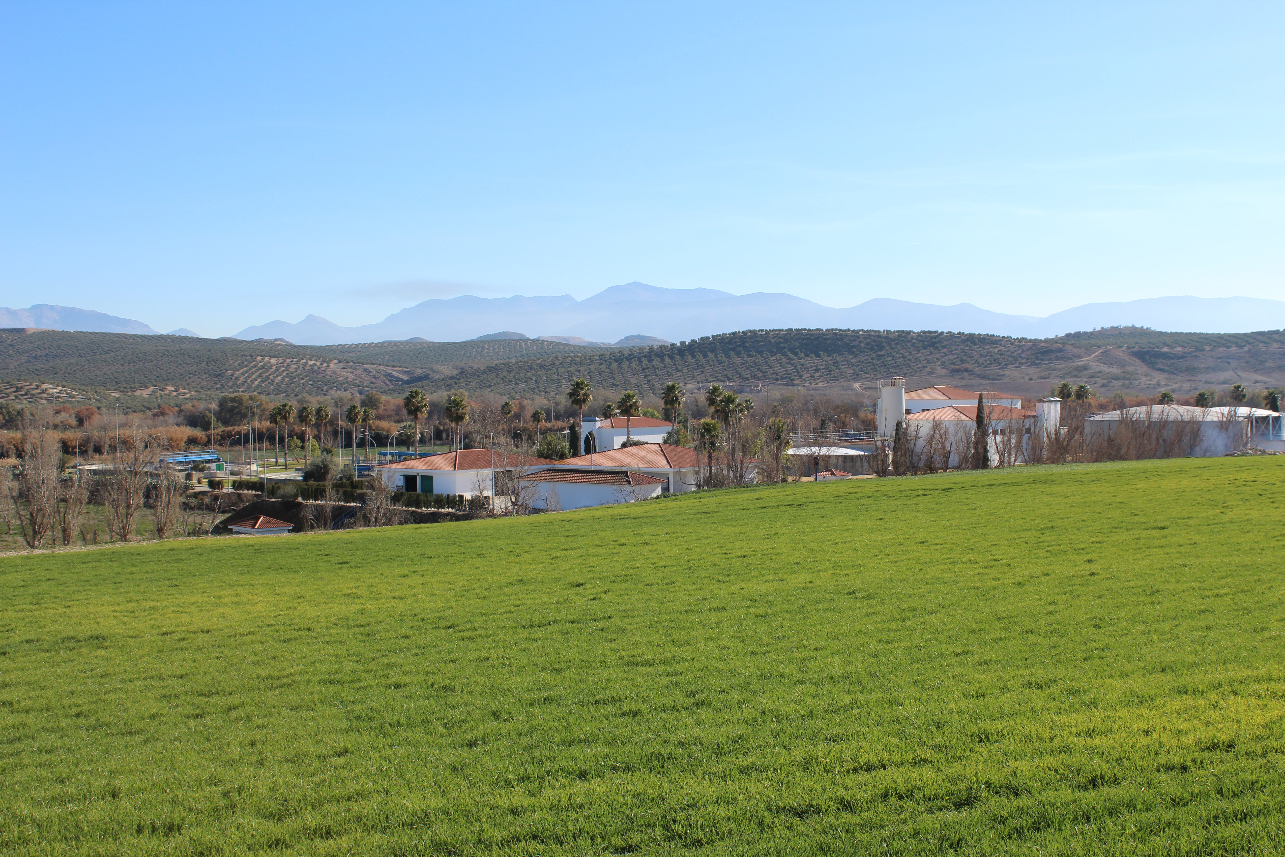 Vista de la EDAR Santa Catalina, junto al río Guadalbullón, encargada de la depuración de las aguas residuales de la ciudad de Jaén.